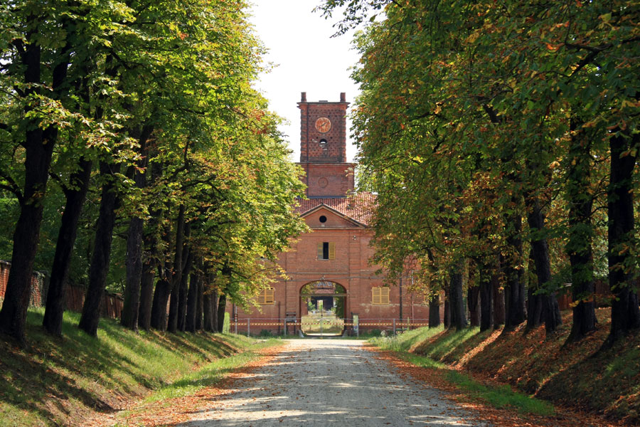 Retro di Borgo Castello nel parco naturale "La Mandria" a Venaria Reale (TO)